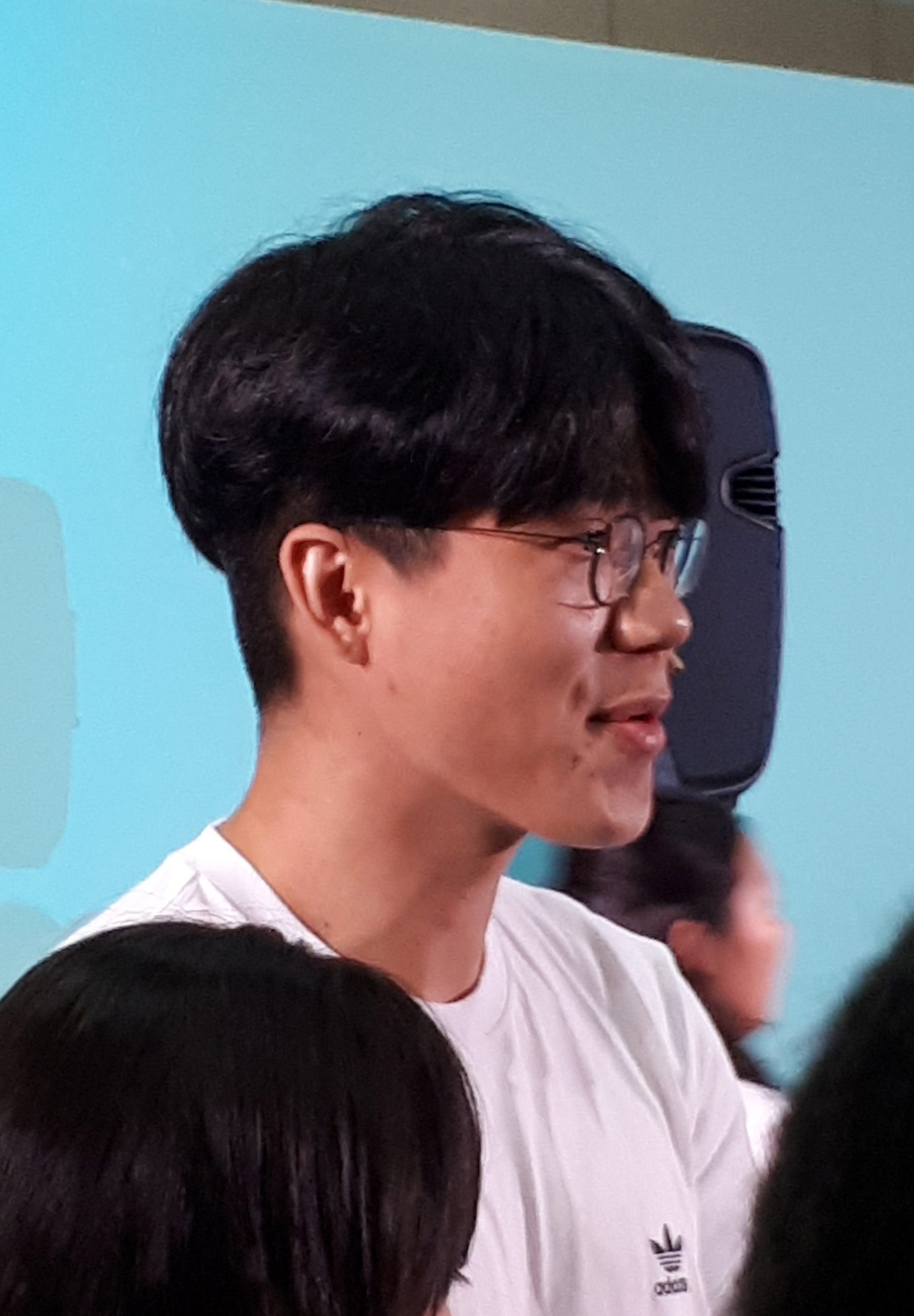 2019년 8월 10일 다이아 페스티벌에 등장한 대한민국의 아프리카 BJ 겸 유튜버 김보겸.